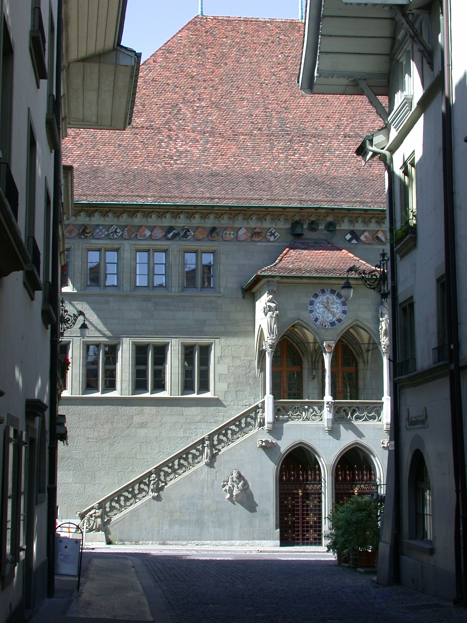 Blick von der Kreuzgasse auf das Berner Rathaus